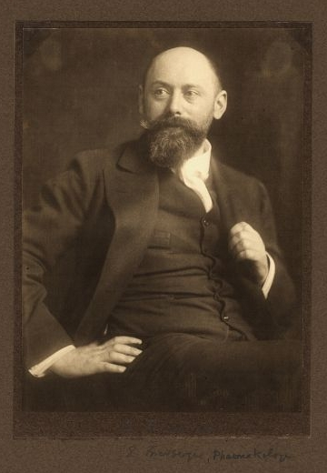 Ernst Friedberger (1875-1932), German immunologist, microbiologist and hygienist